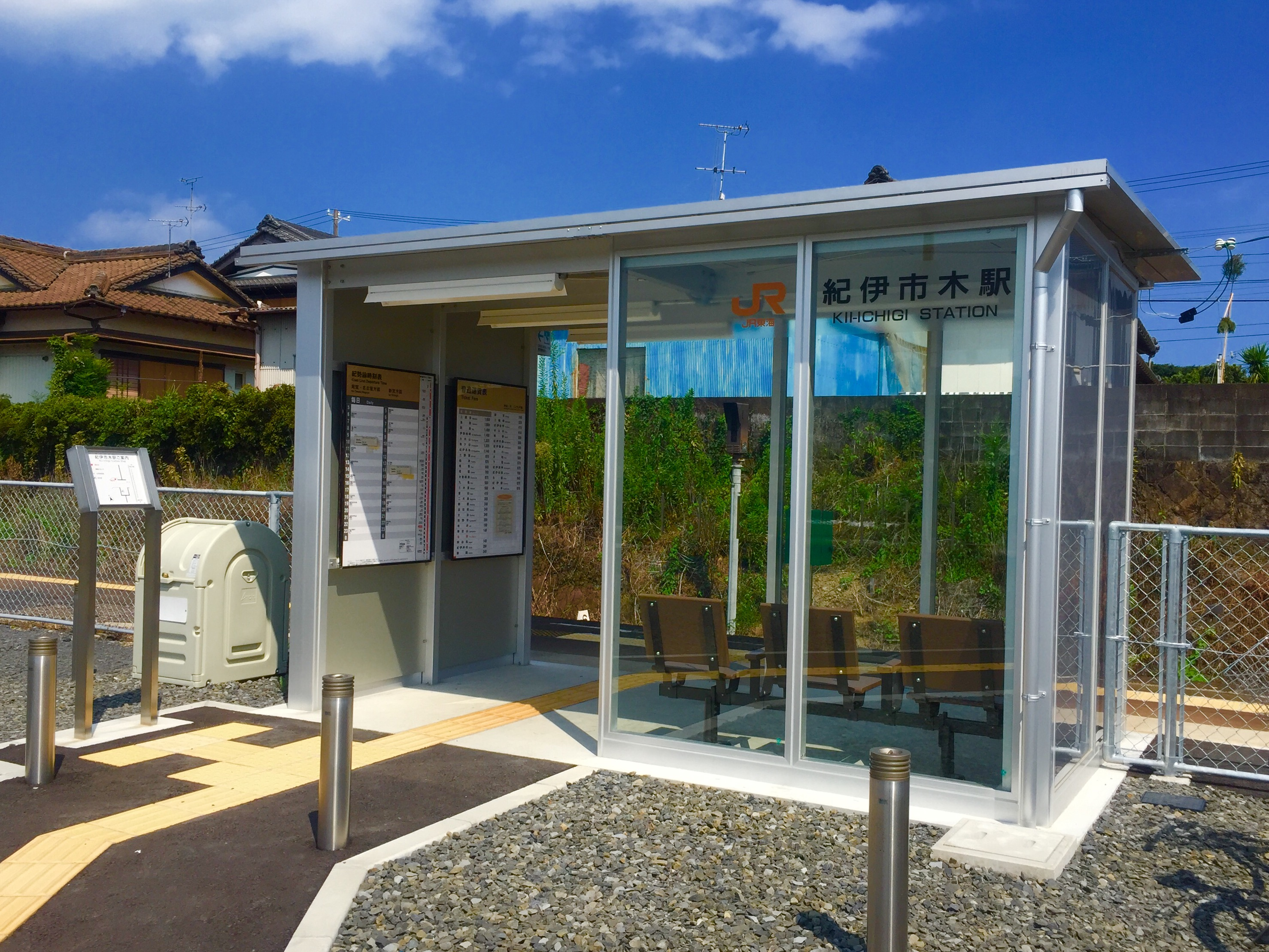 2016年撮影の紀伊市木駅